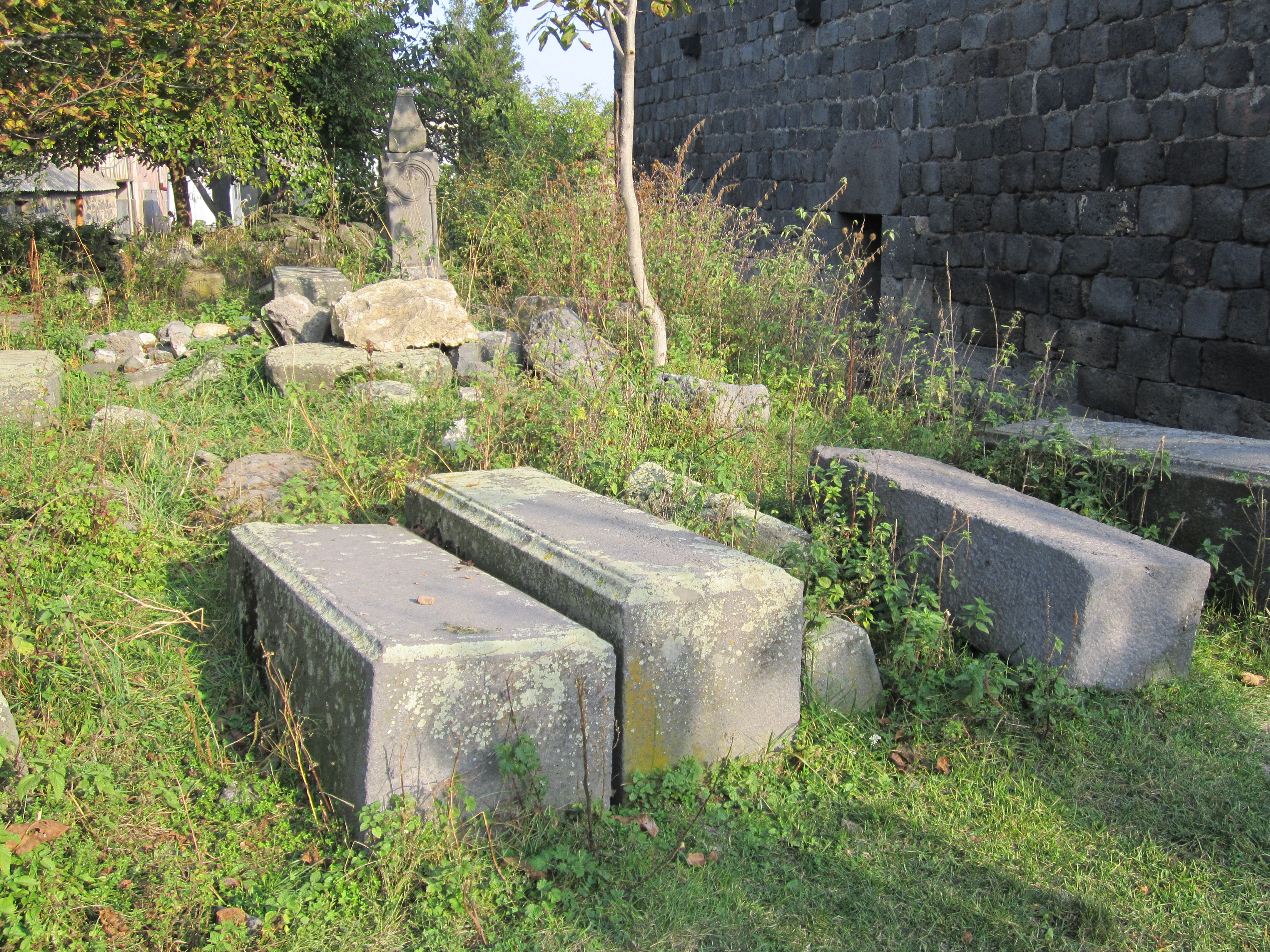 Կուրթան Սուրբ Աստվածածին եկեղեցի 57/7